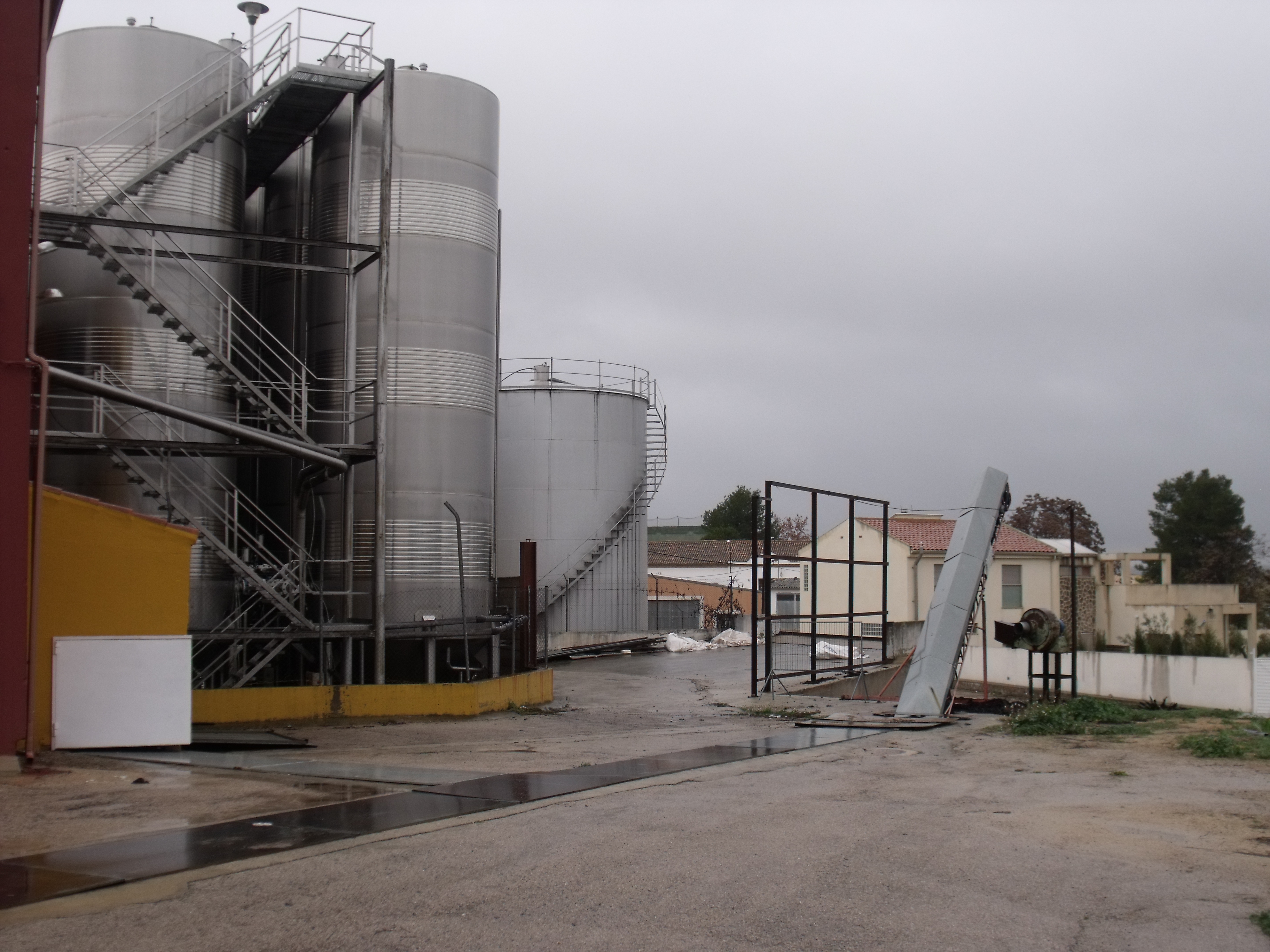 Diversas imágenes de la Cooperativa agrícola la Purísima Concepción. Los Pedrones.